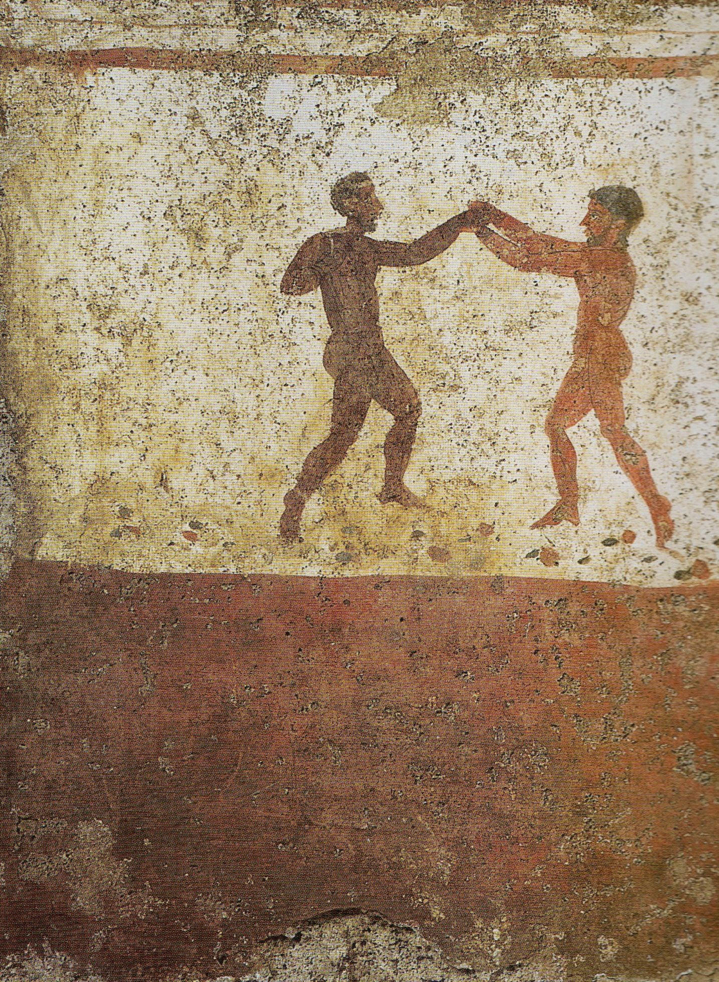 Paestum, Grab der Nereide. Detail